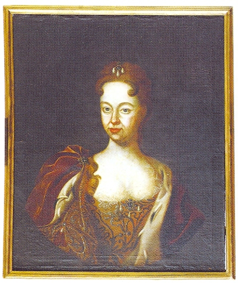 Sophie Wilhelmine von Sachsen-Coburg-Saalfeld (1693-1727), Fürstin von Schwarzburg-Rudolstadt